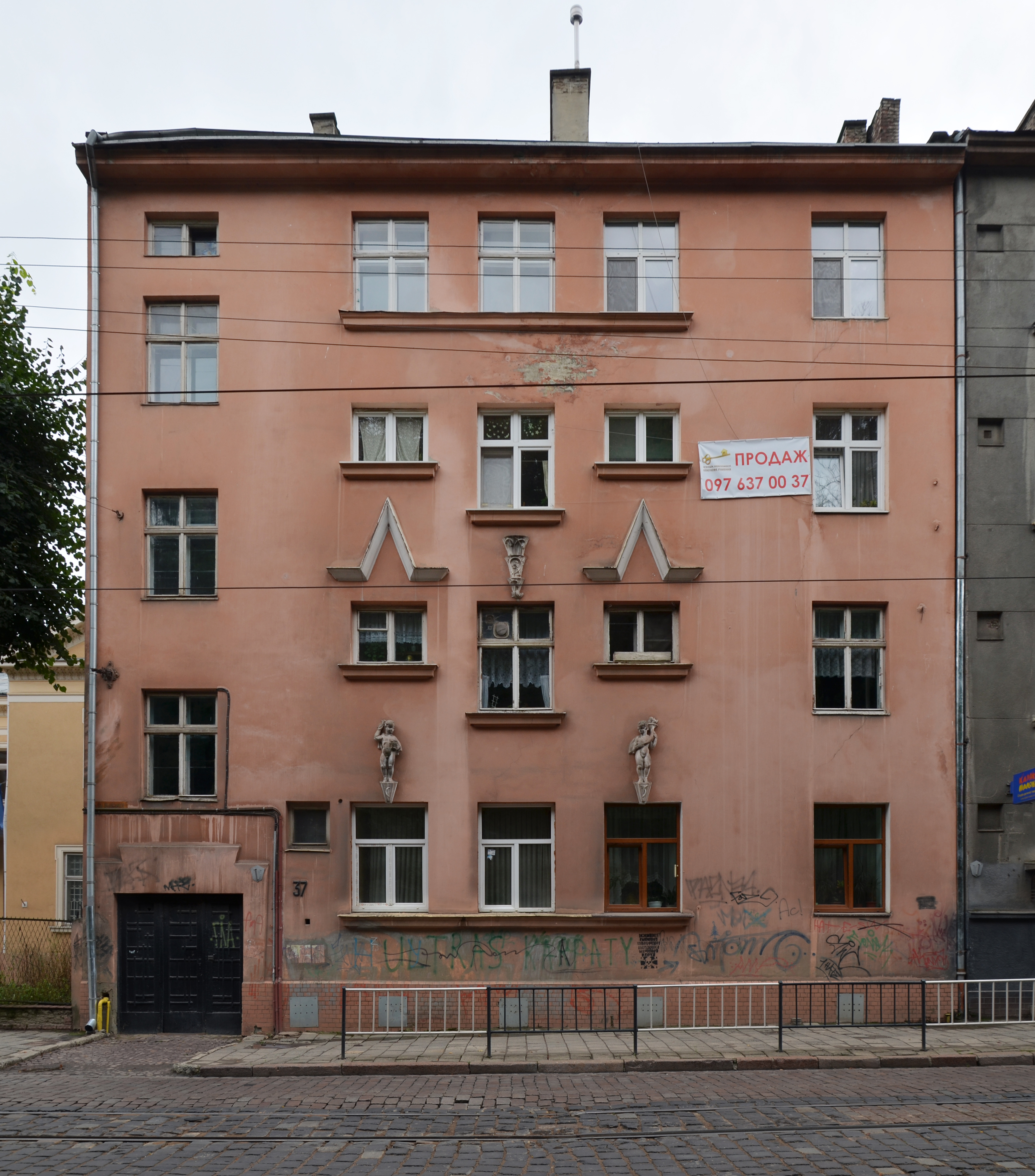 Будинок № 37 на вулиці Вітовського у Львові.